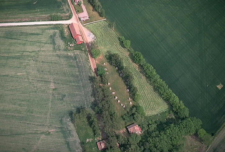 Vad 10:1, Skeppssättning Motiv: Vad 10:1 Nyckelord: Flygbilder, Riksintressen Kategori: Stenkrets/domarring/skeppssättning Vad 10:1, Skeppssättning. Vad 10:1.